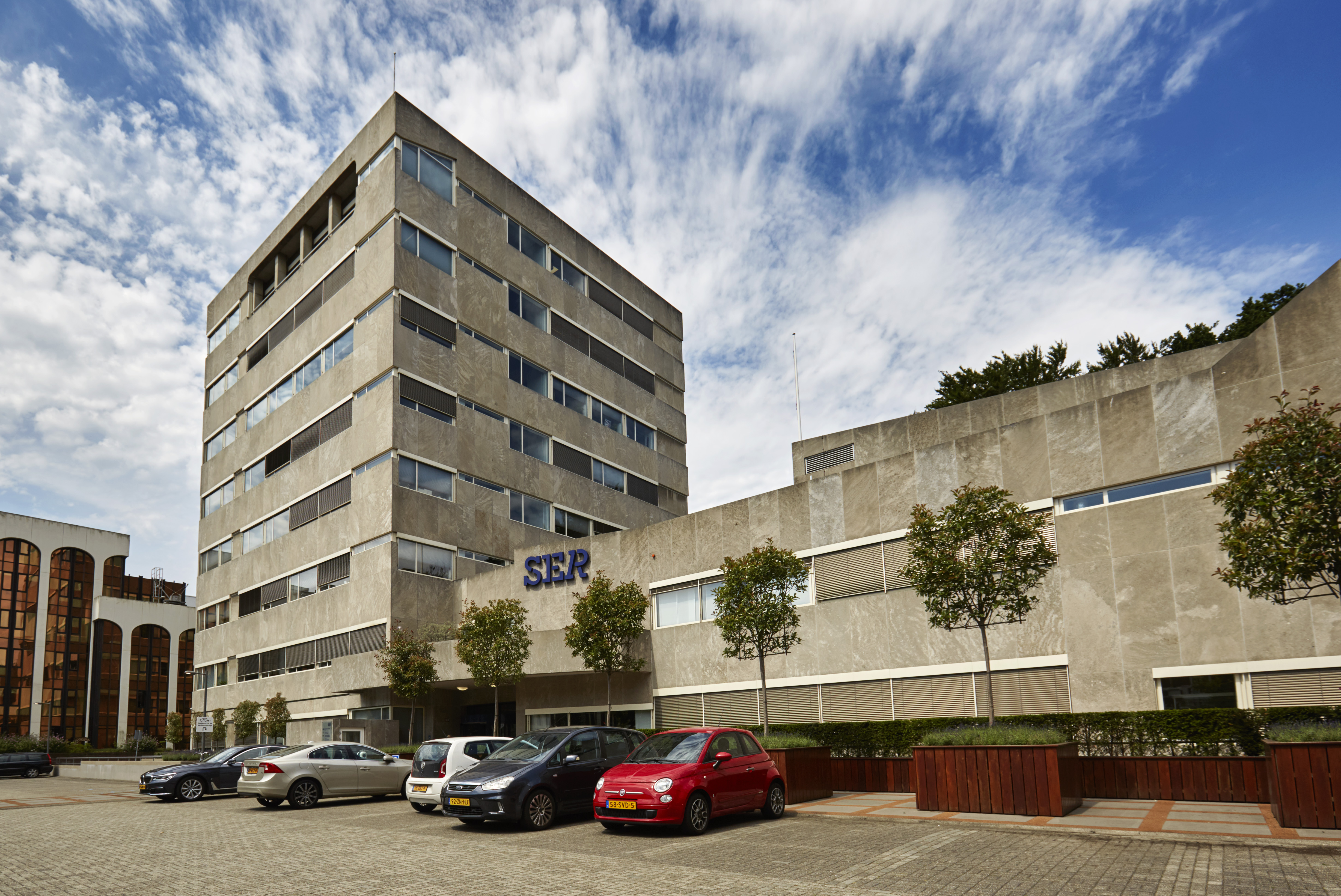 SER-gebouw in Den Haag, foto in opdracht genomen.